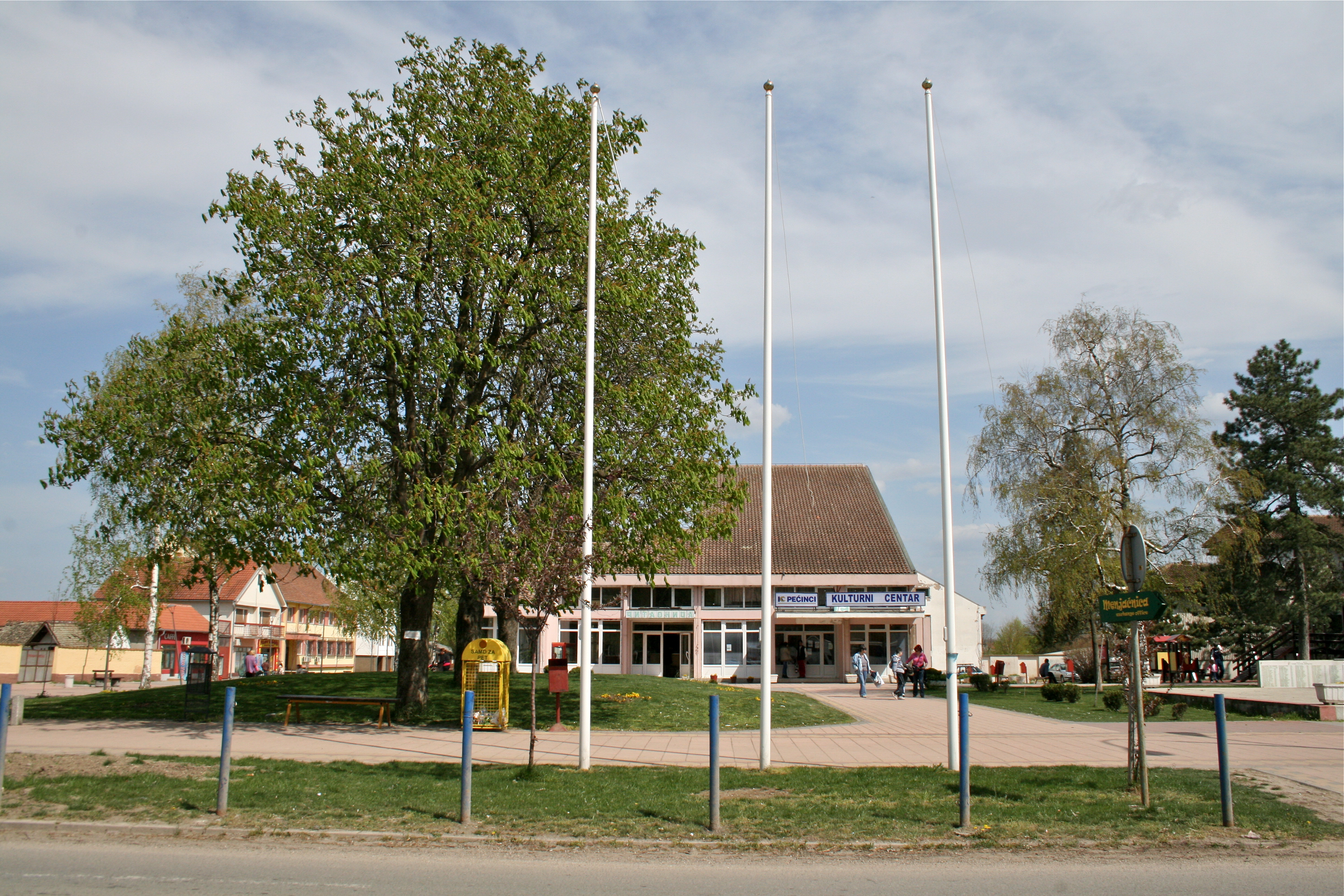 Културни центар Пећинци